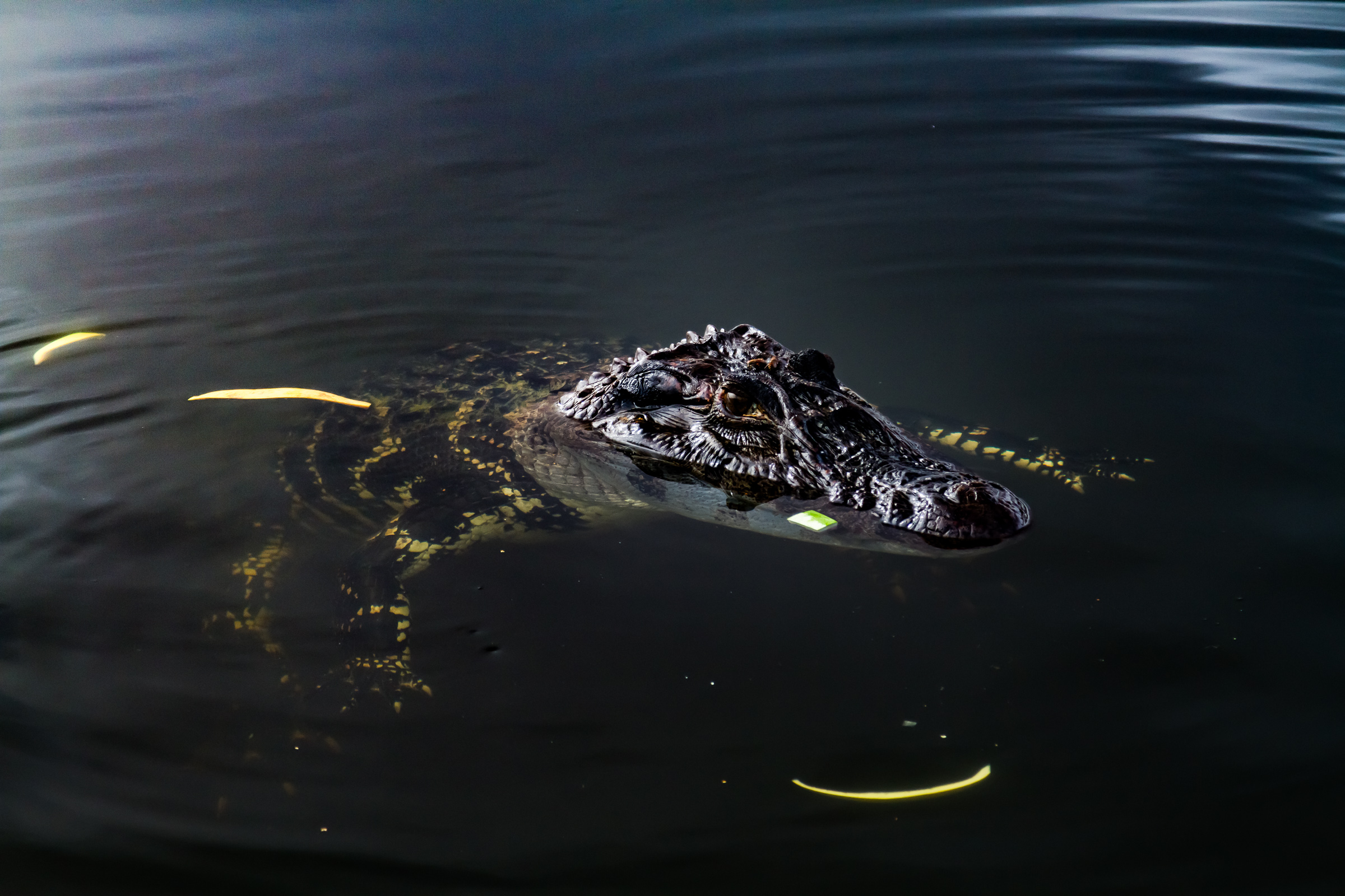 Um jacaré-açú (Melanosuchus niger) bóia no rio Jauaperi, RR